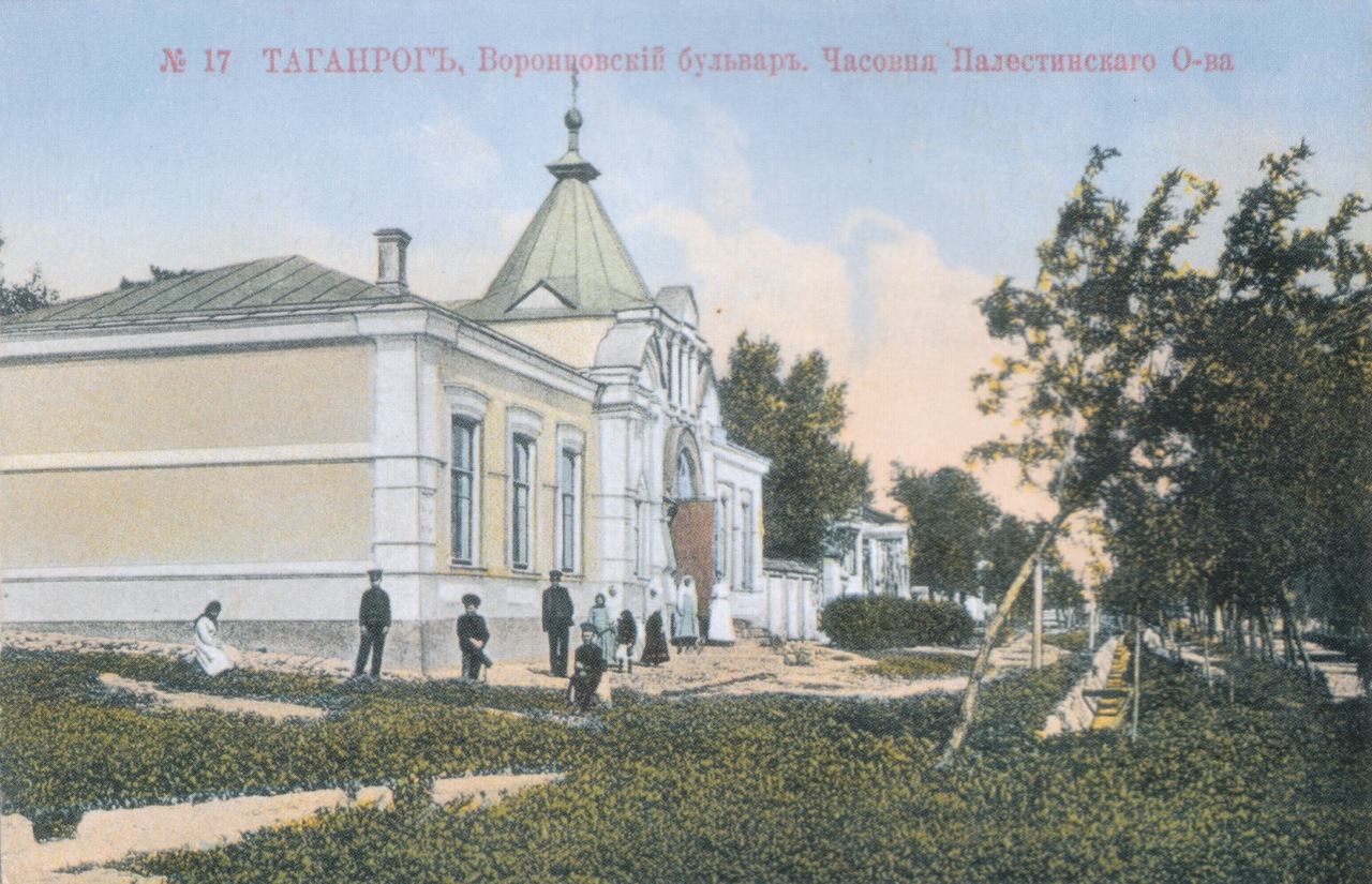 Часовня палестинского общества на Воронцовском бульваре в Таганроге